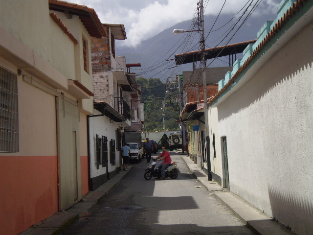 pasaje calderon